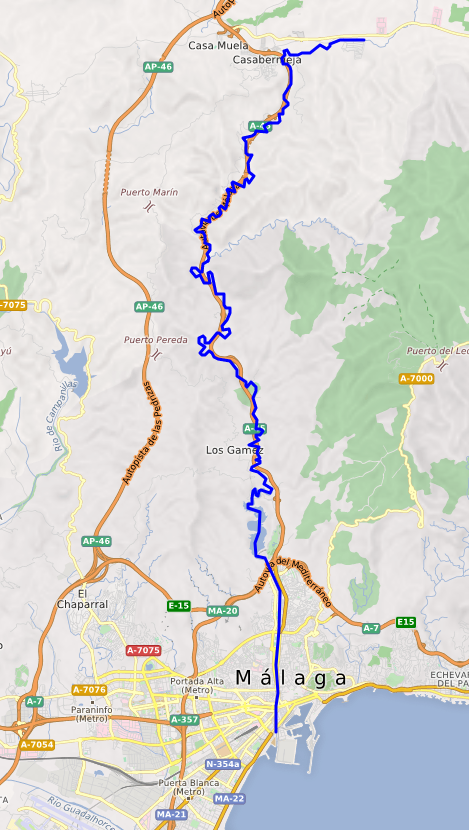 carte réalisée sur umap This map may be incomplete, and may contain errors. Don't rely solely on it for navigation.